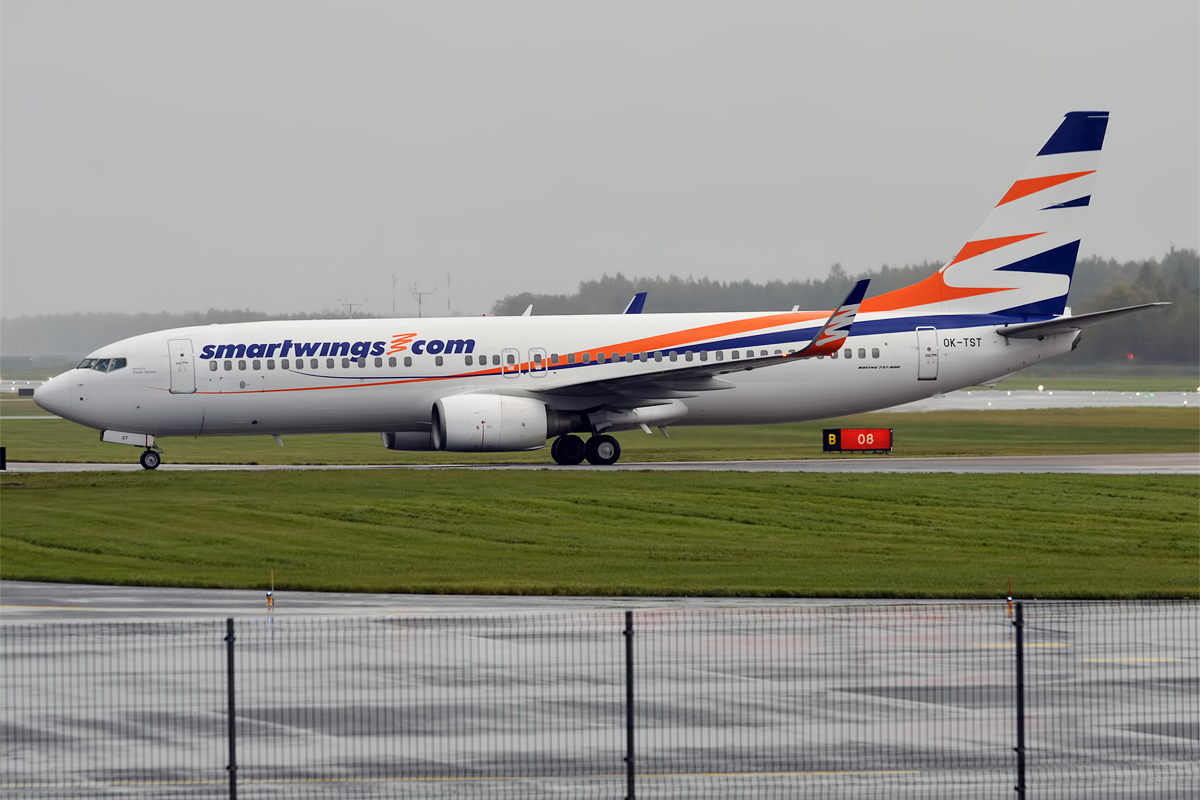 SmartWings, OK-TST, Boeing 737-86N